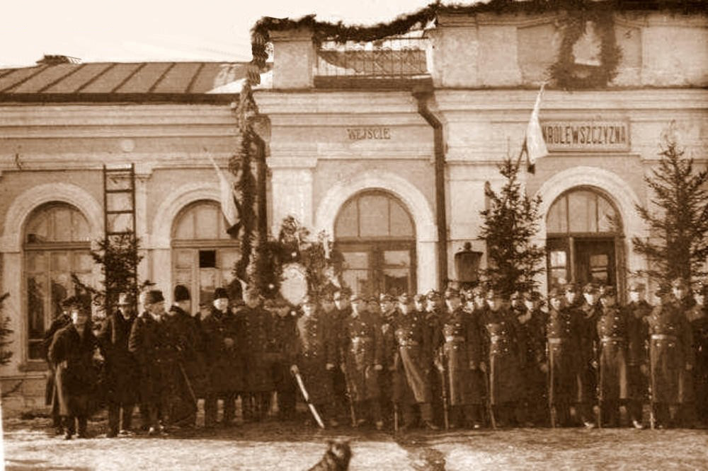 Беларуская (тарашкевіца): Каралеўшчына (Karaleŭščyna). Чыгуначная станцыя